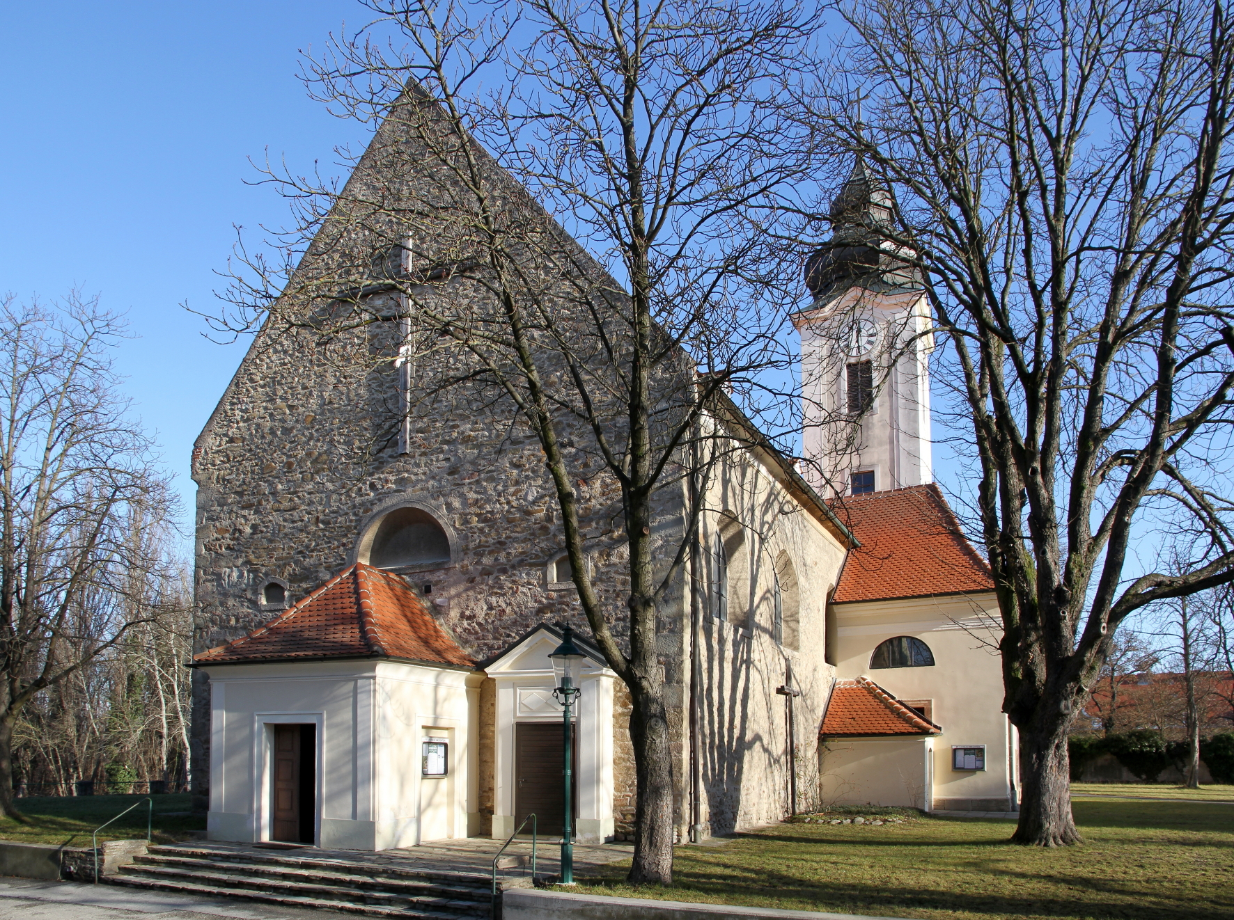 Westansicht der katholischen Pfarrkirche hl. Stephan in der niederösterreichischen Marktgemeinde Zwentendorf an der Donau.